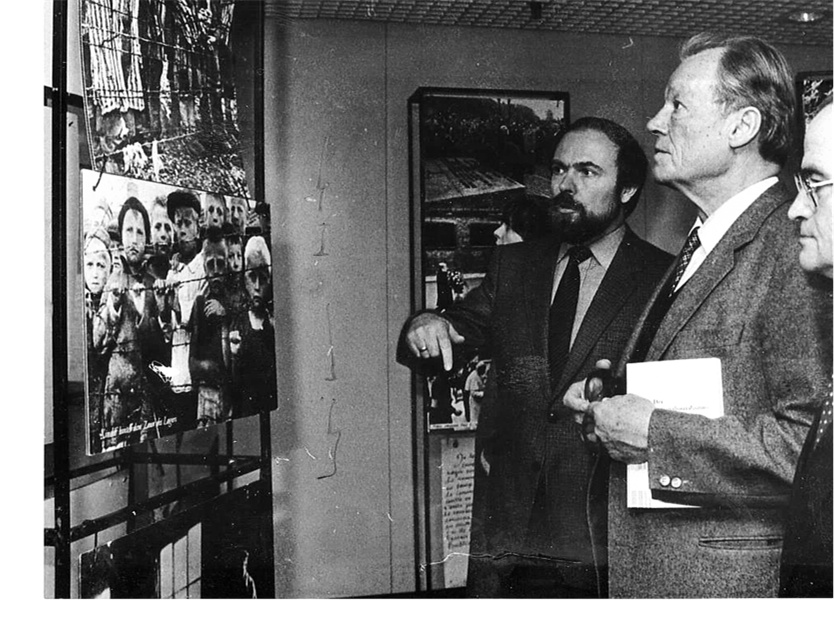 Klaus Taubensee führt Schirmherr Willy Brandt am 23. Januar 1981 durch die von ihm initiierte Ausstellung über das ehemalige KZ Auschwitz im Bonner Stadthaus